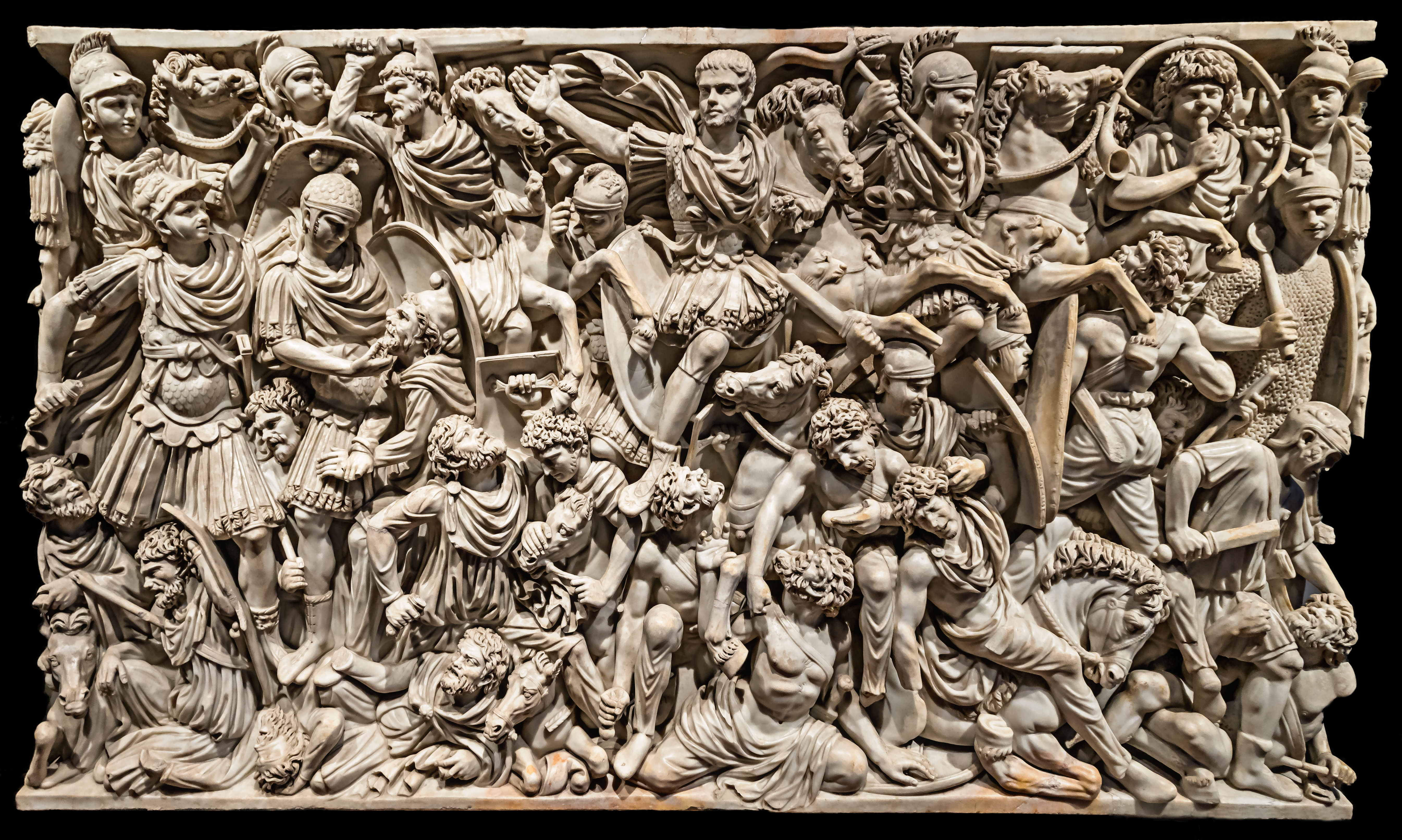 Der Sarkophag wurde 1621 in der Nähe der Porta Tiburtina in Rom gefunden und gelangte als Schenkung des Kapitels der Basilika von Santa Maria Maggiore in die Sammlung des Kardinals Ludovico Ludovisi. Die aufgenommene Frontdekoration ist in drei Ebenen dargestelltt: Die siegreichen römischen Soldaten sind zusammen mit dem als Feldherrn dargestellten Verstorbenen im oberen Drittel abgebildet. Der zentrale Teil besteht aus der eigentlichen Schlacht zwischen Römern und Barbaren. Im unteren Bereich liegen die besiegten Feinde auf dem Boden. Diese Arbeit ist ein Beispiel für viele Sarkophage aus der Mitte des 2. und dem frühen 3. Jahrhundert, die als Thema eine Schlacht zeigen.